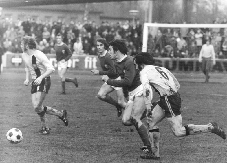 ADN-ZB-Liebers-30.11.74-ba-Jena: FC Carl Zeiss Jena besiegte Dynamo Dresden - Im Sturmlauf starten Vogel (2.v.r.) und Irmscher (3.v.r.) vom FC Carl Zeiss Jena einen Konterangriff, rechts Häfner; links Weber (beide Dresden). Die Jenenser bezwangen am 30.11.74 im Punktspiel der Fußball-Oberliga die Mannschaft Dynamo Dresden vor eigenem Publikum mit 3:1.